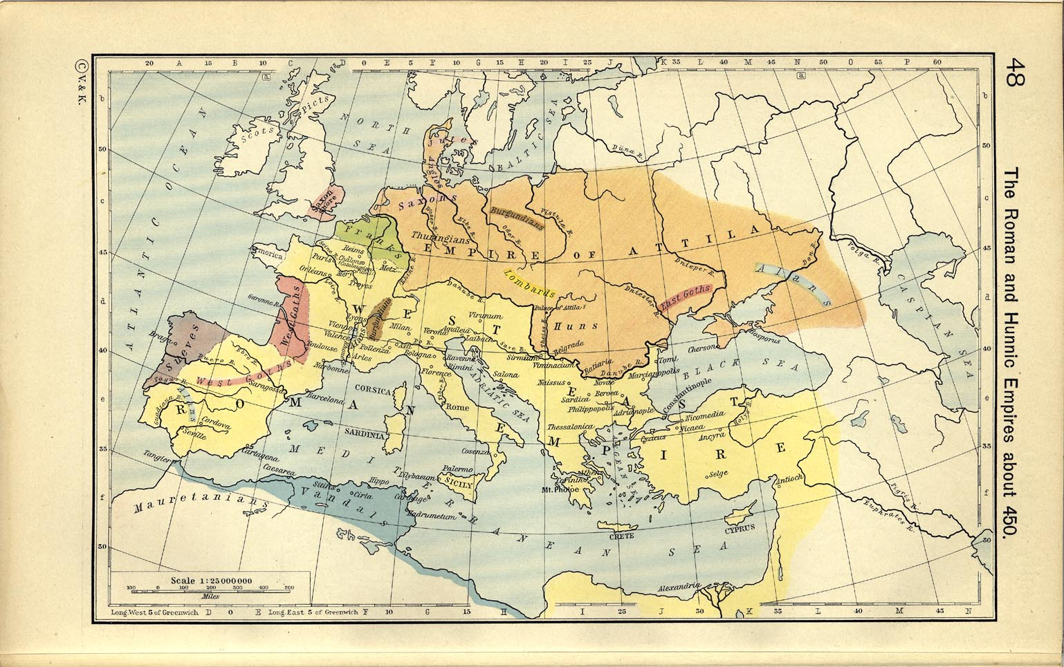 The Roman and Hunnic Empires about 450